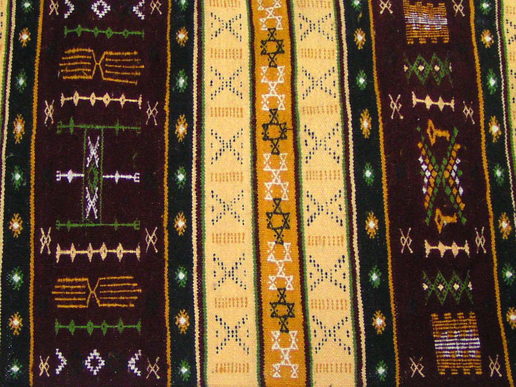 TapisKabyle2.jpg